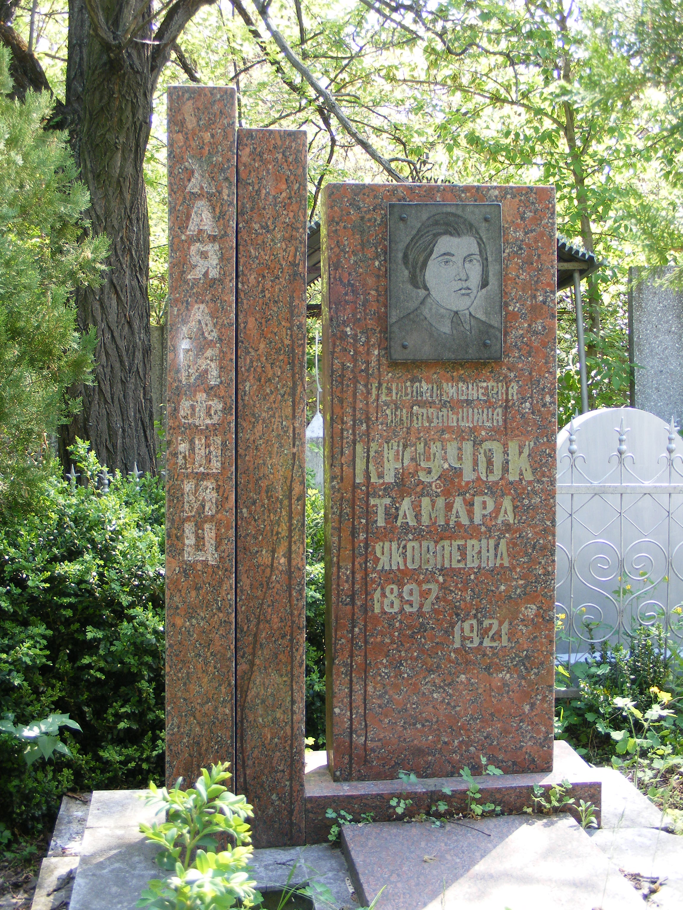 Памятник двум революционеркам подпольщицам - Хае Лившиц и Тамаре Крючок на еврейском кладбище г. Бендеры